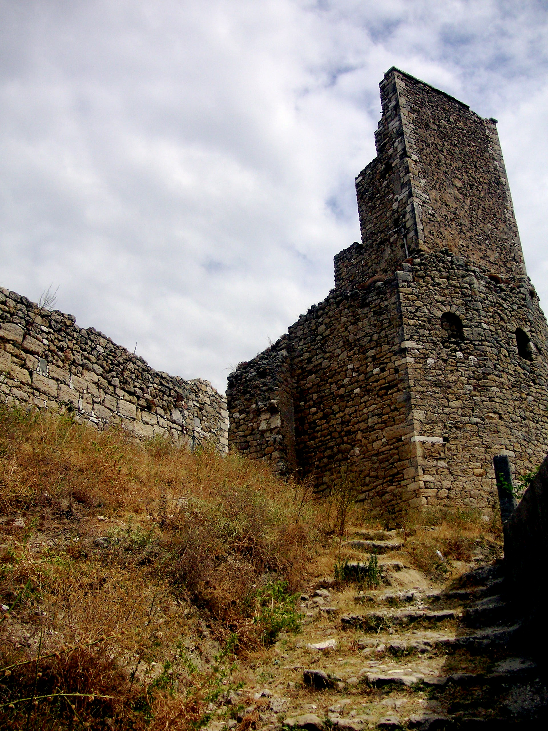 A castle near Vlore, Albania